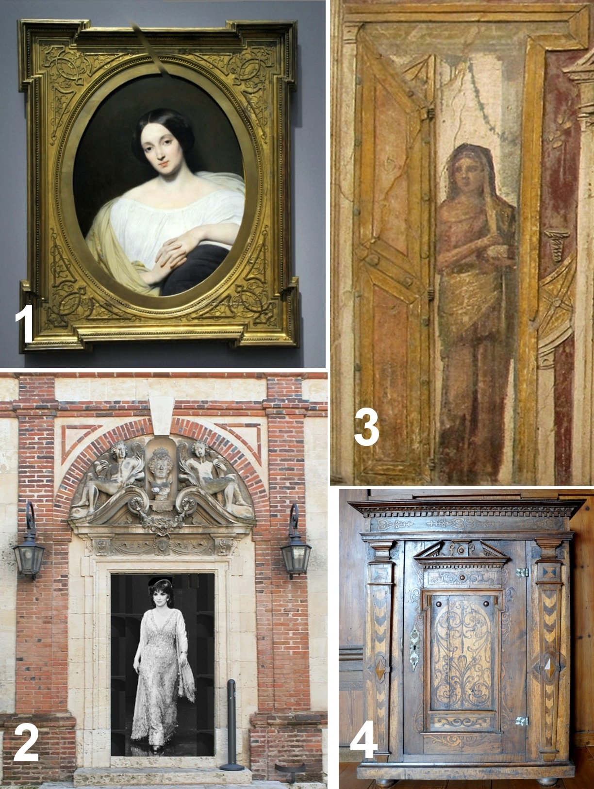 Ohren in Architektur, Möbeltischlerei und Rahmenmacherei. – 1 Bilderrahmen mit verkröpften Ohren, 2 Tür mit verkröpften Ohren, 3 Tür mit verkröpftem Ohr, 4 Bilderrahmen mit angesetzten Ohren.